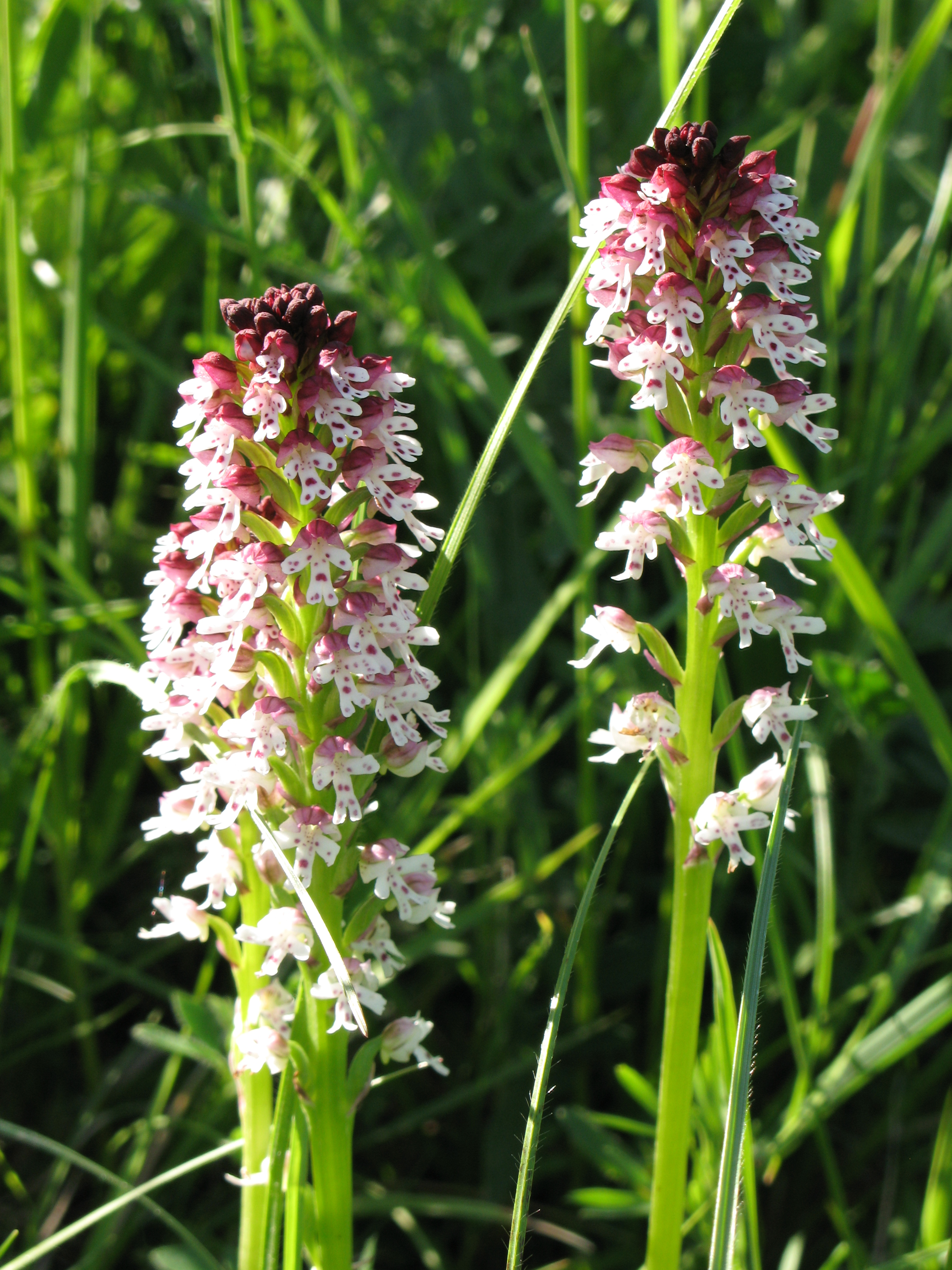 Brand-Knabenkraut (Orchis ustulata) im Naturschutzgebiet Hochberg im Kaiserstuhl.